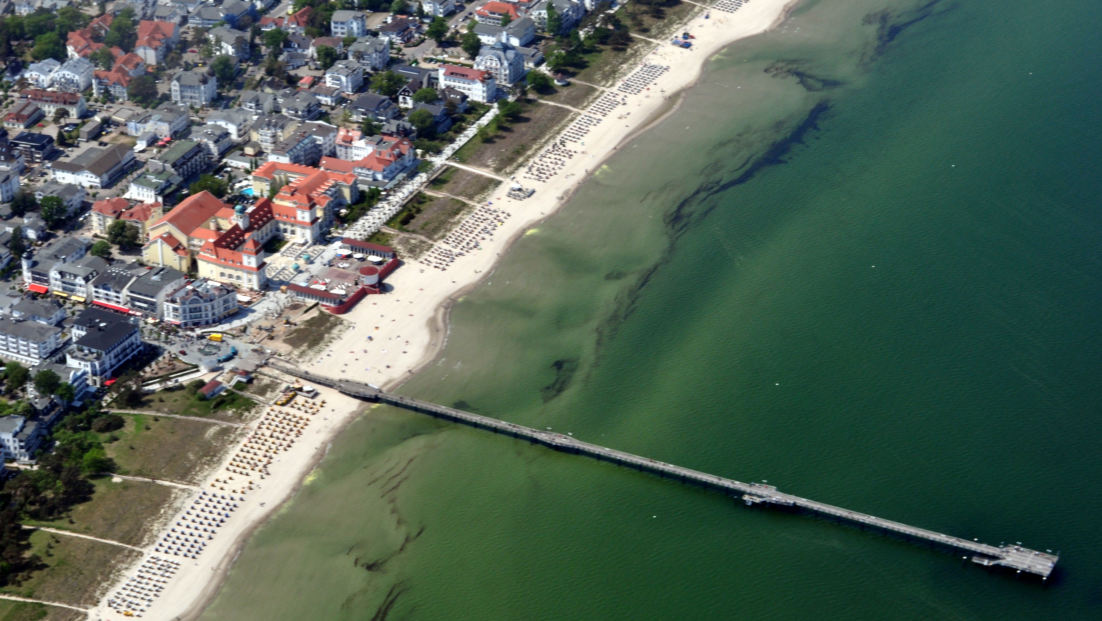 Die Bilder wurden von mir während eines einstündigen Rundflugs ab Flugplatz Güttin am 21. Mai 2011 aufgenommen. Die Bildbeschreibung steht im Dateinamen. Aufgenommen mit einer Nikon D5000 durch das Seitenfenster des Flugzeugs.